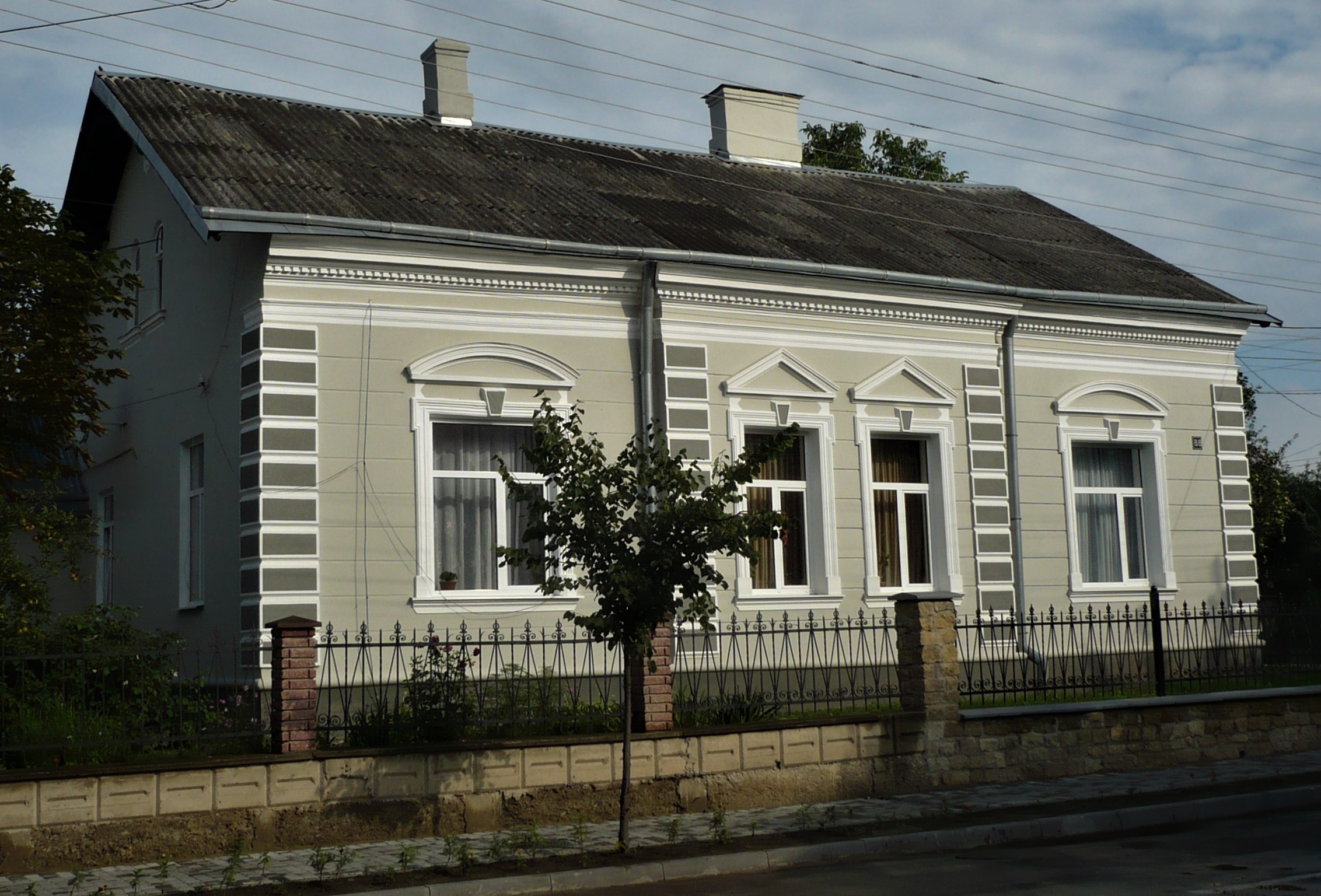 Dom w Złoczowie